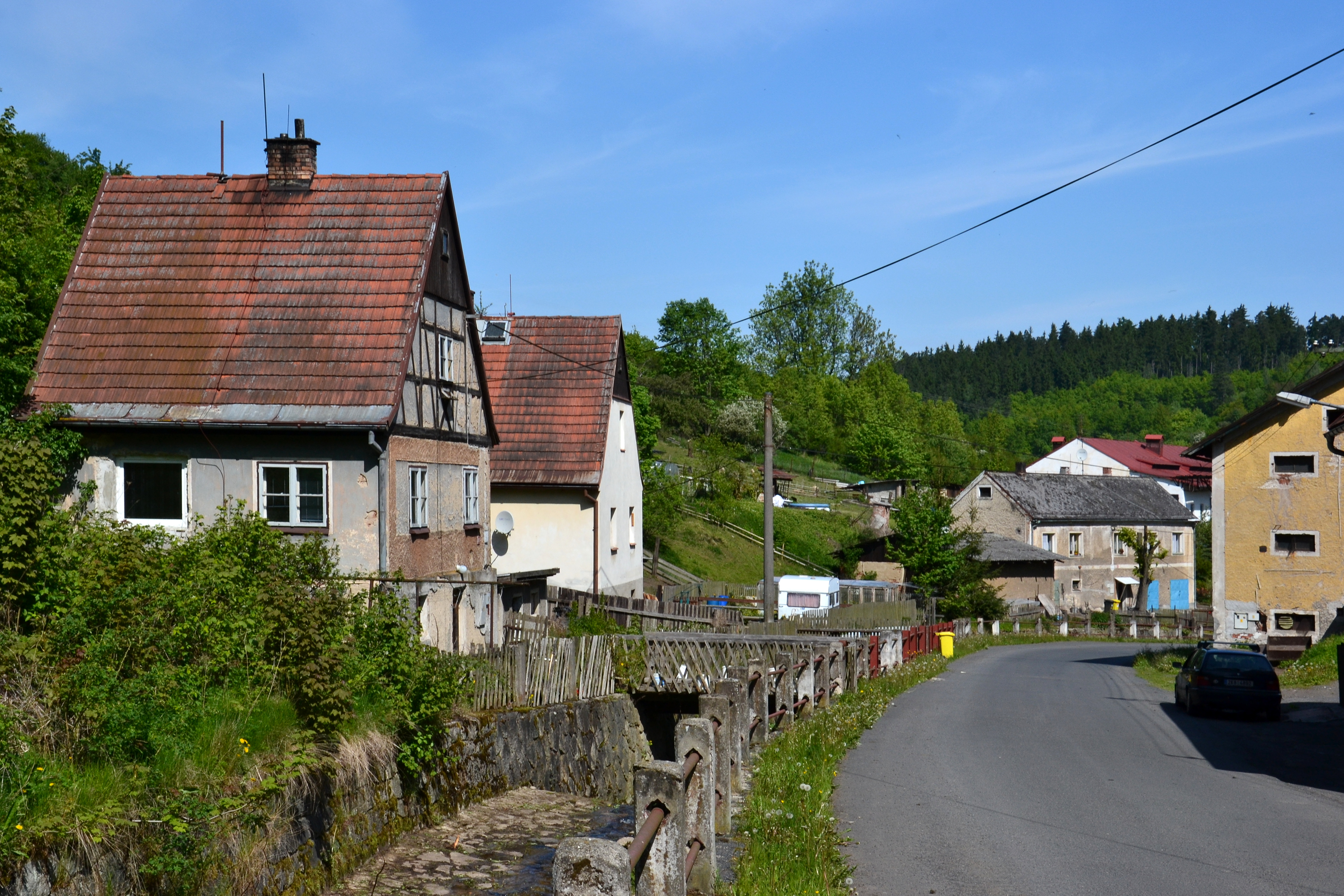 Lučiny v roce 2012